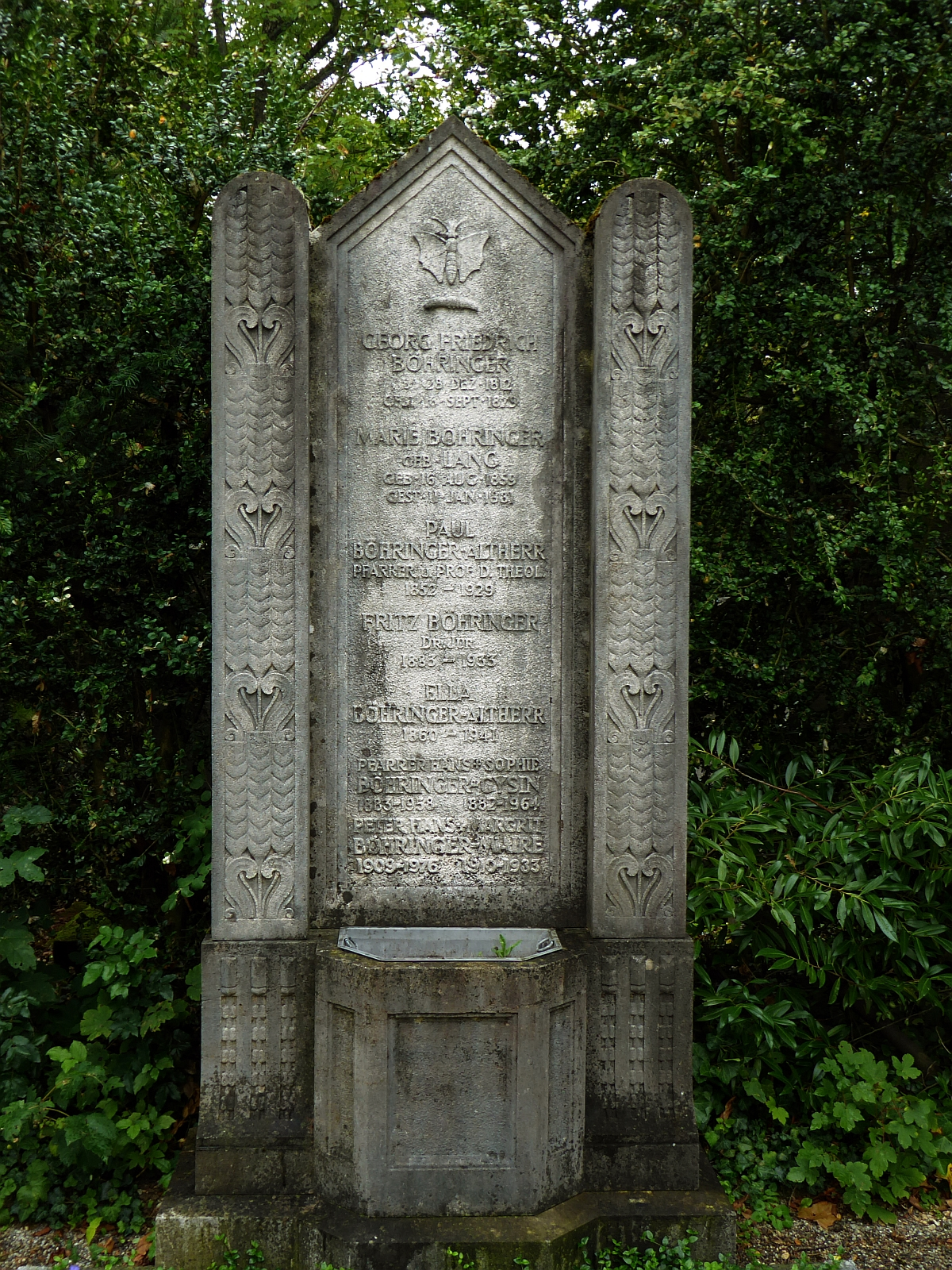 Peter Hans Böhringer-Maire (1909–1976), Sprachlehrer, Politiker, Grab auf dem Friedhof Wolfgottesacker, Basel